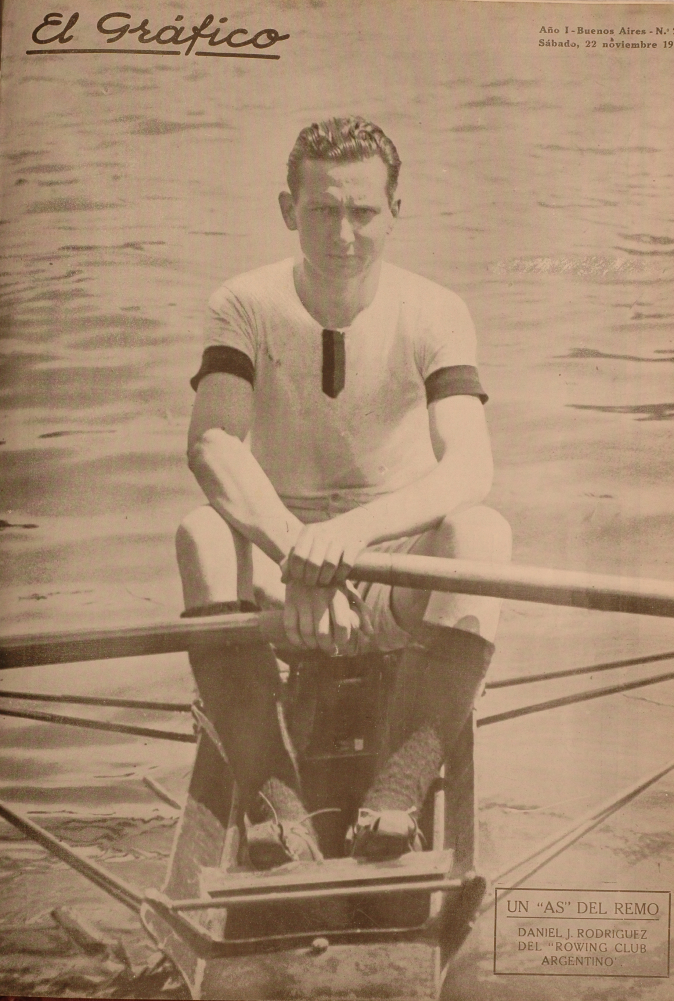 El Grafico del 22 de Noviembre de 1919. Edicion 22